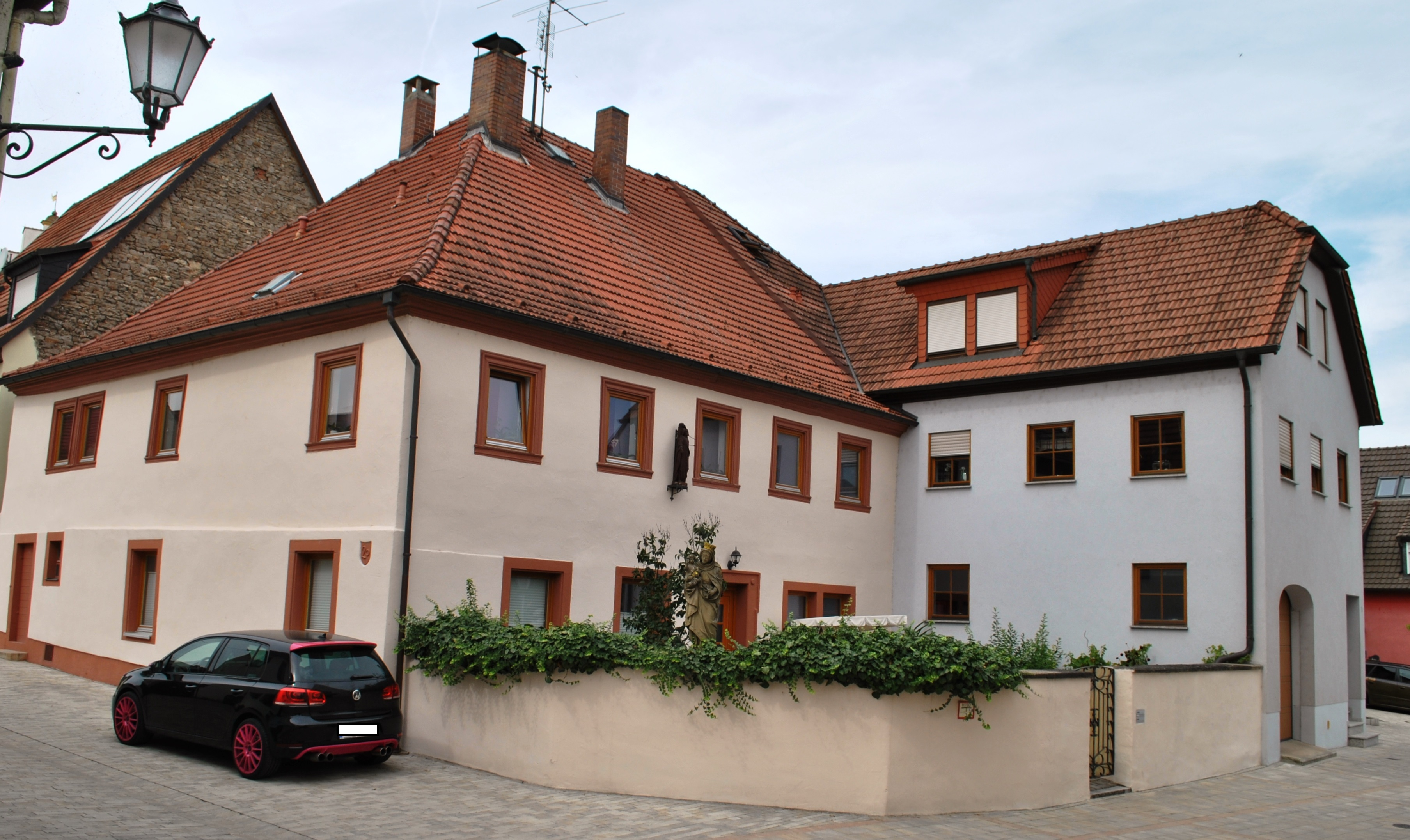 Wohnhaus Zweigeschossiger Walmdachbau mit verputztem Fachwerkobergeschoss, bezeichnet „1621“, auf der Mauer MadonnenfigurThis is a photograph of an architectural monument.